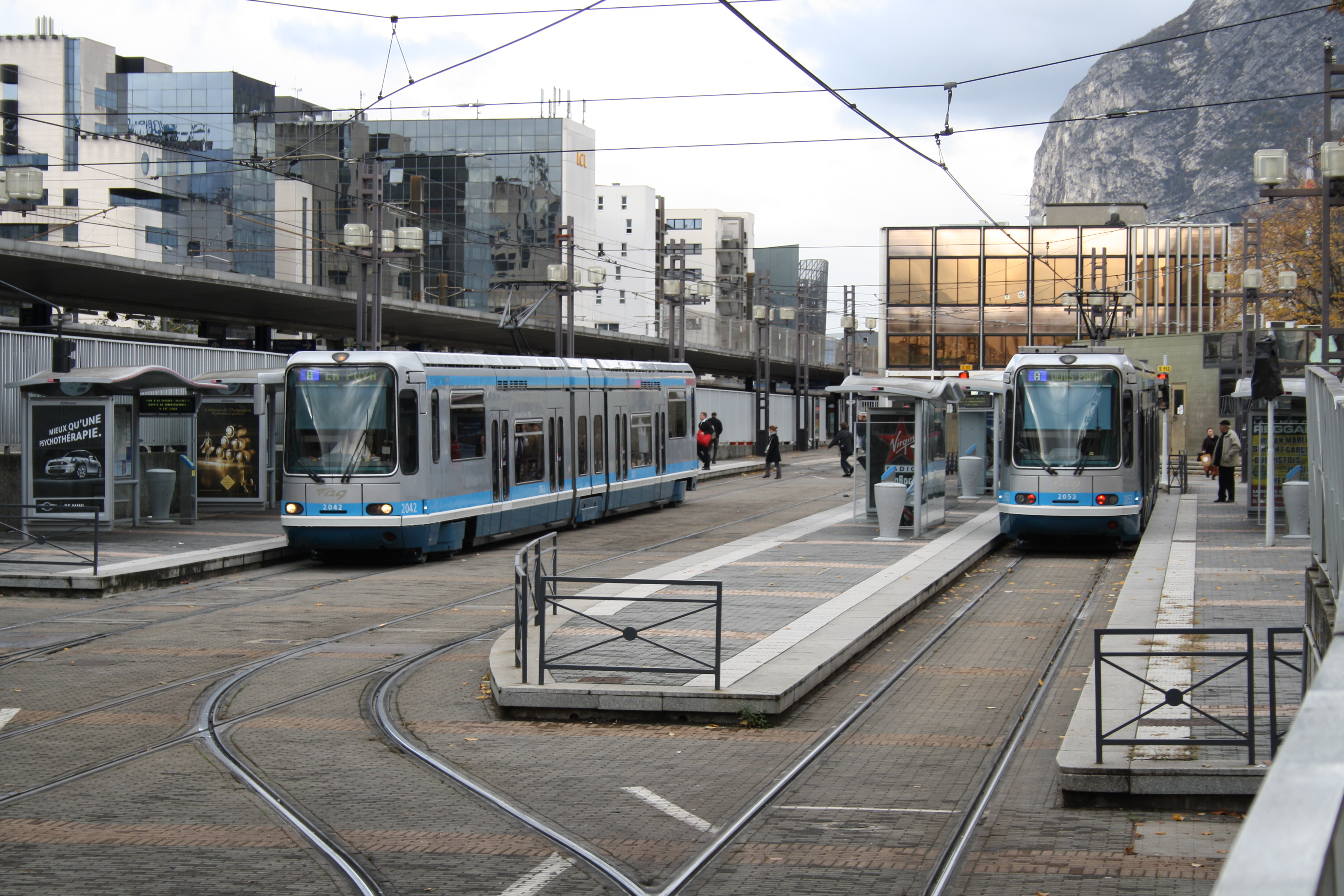 Place de la Gare in Grenoble mit Straßenbahnfahrzeugen des Typs TFS